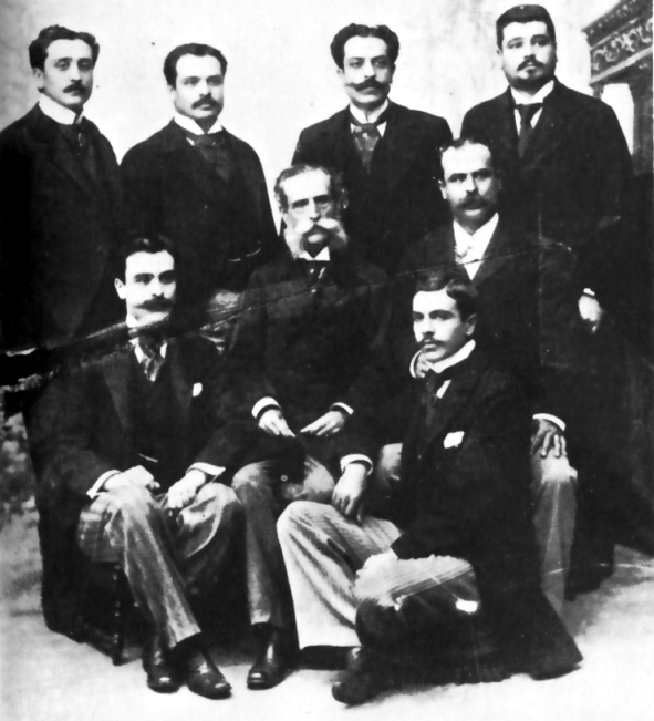 Pedro Alejandrino del Solar, miltar y político peruano, rodeado de sus hijos